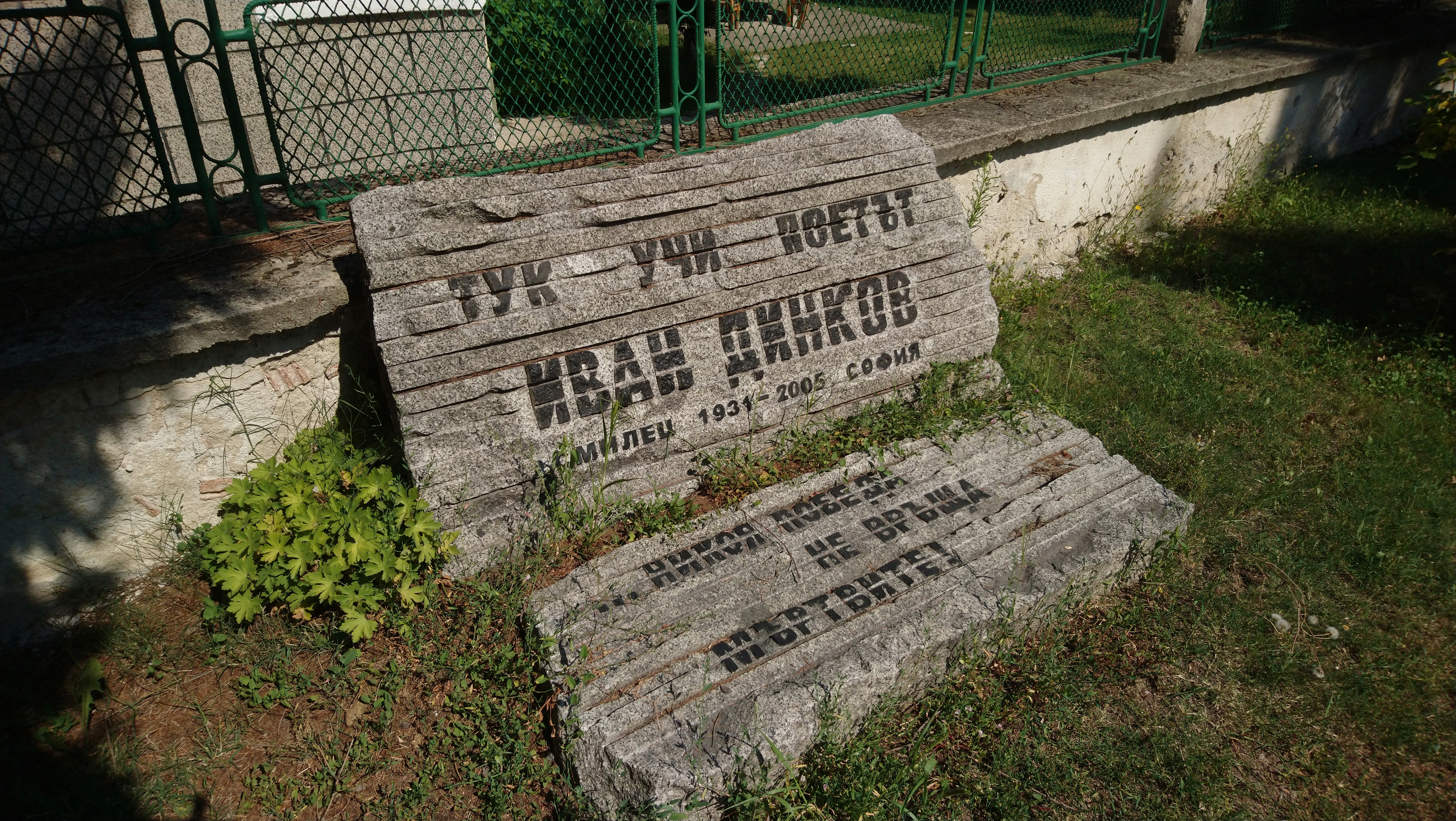 Паметна плоча на поета Иван Динков пред училище Св. Св. Кирил и Методий, Стрелча